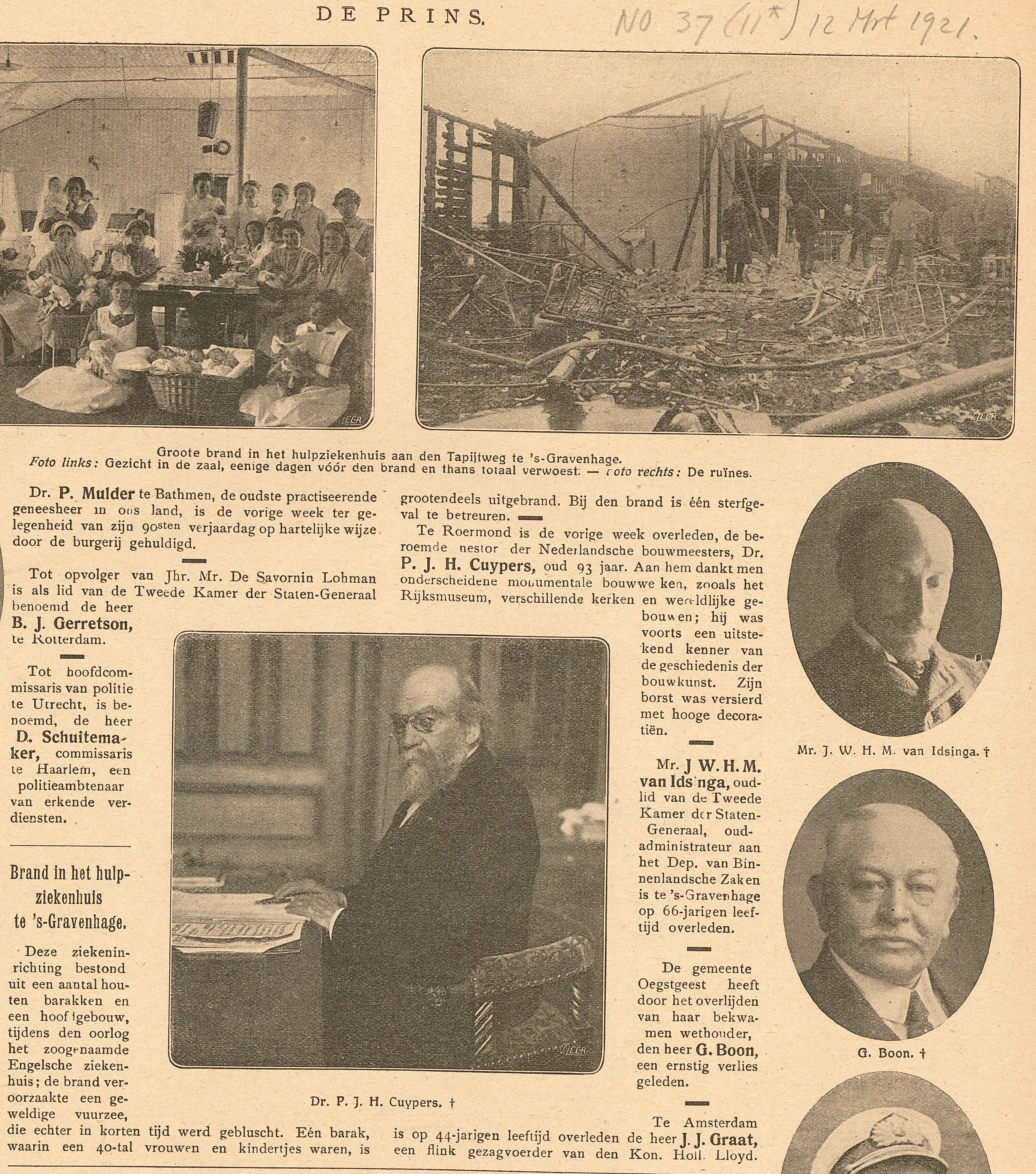 Weekblad De Prins der Geïllustreerde Bladen van 12 maart 1921 met op p. 132 bericht van het overlijden van P.J.H. Cuypers. printed matter. 38 × 28 cm (14.9 × 11 ″). Roermond, Cuypershuis.